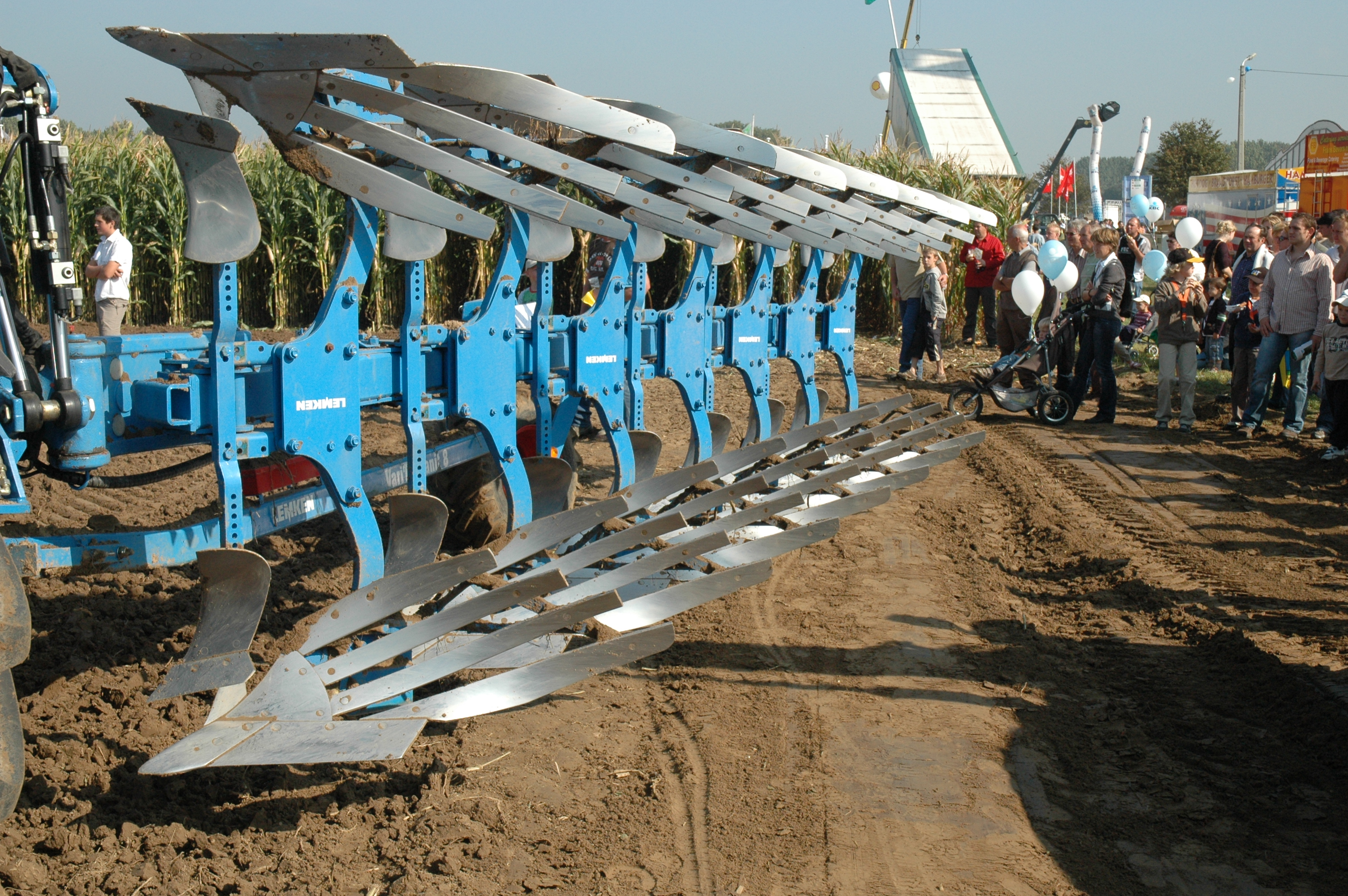 Lemken VariTansanit